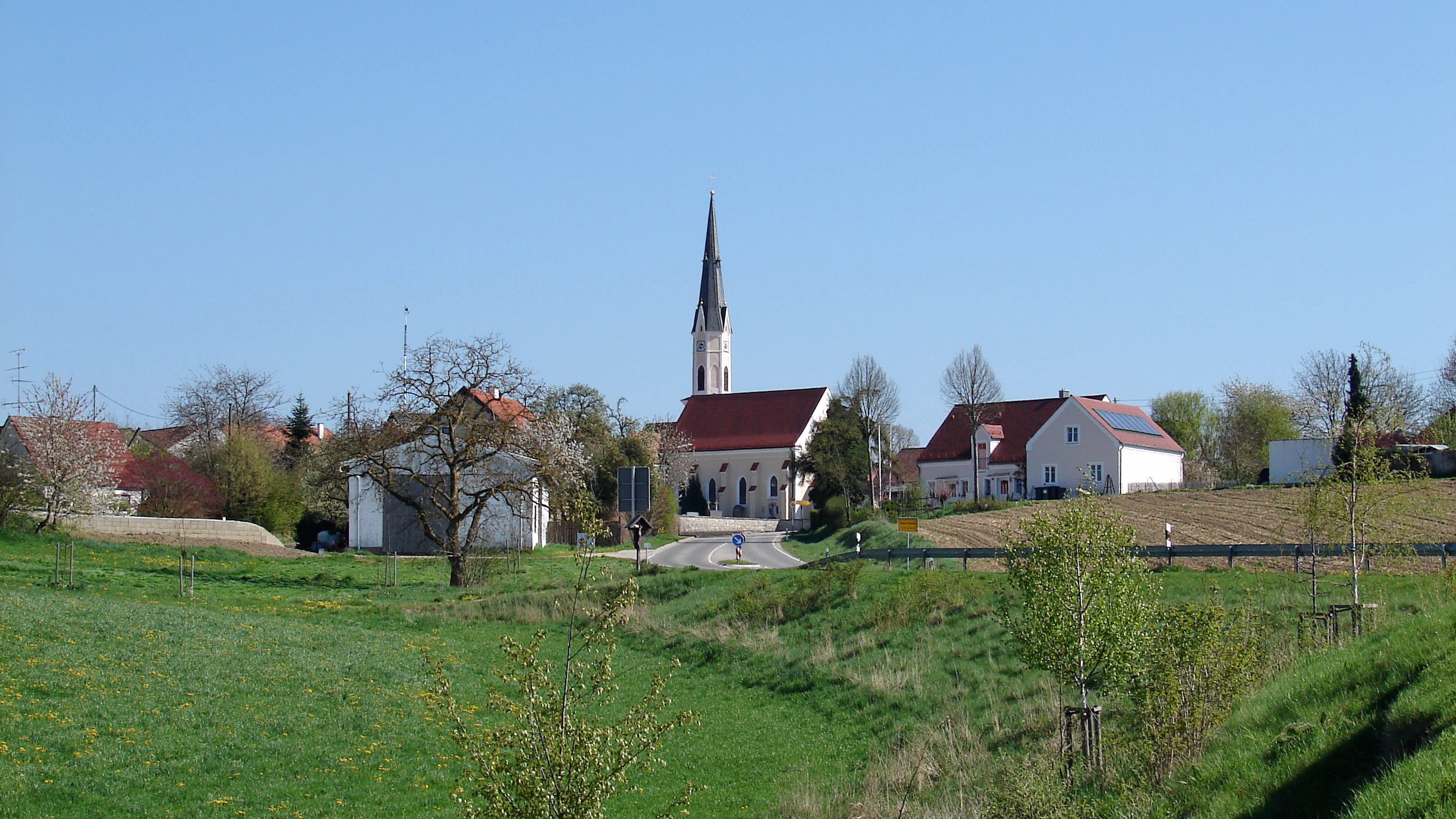 Reichertshausen ist ein Ortsteil des Marktes Au in der Hallertau in Oberbayern.